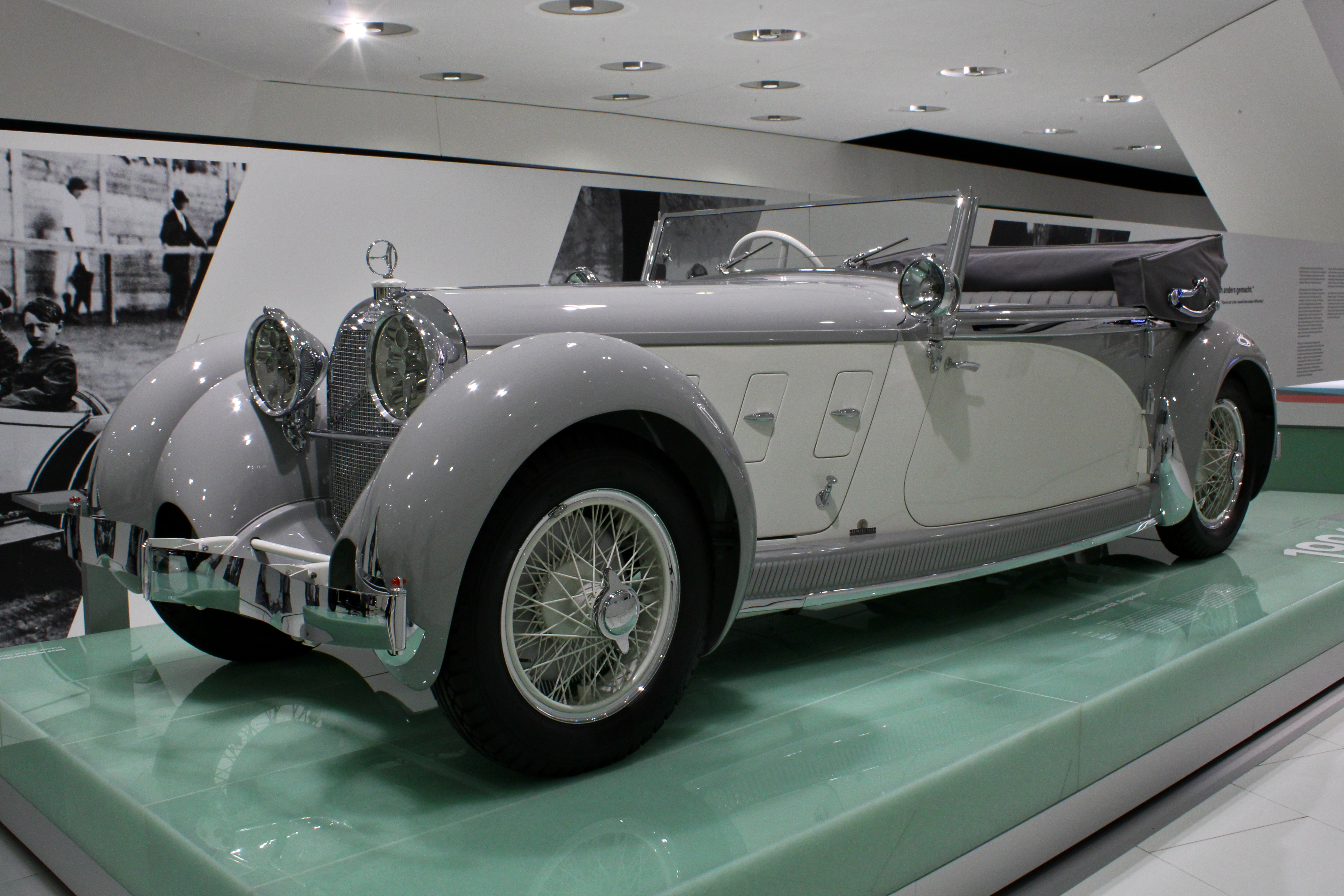 Austro-Daimler ADR Bergmeister im Porsche Museum 2018